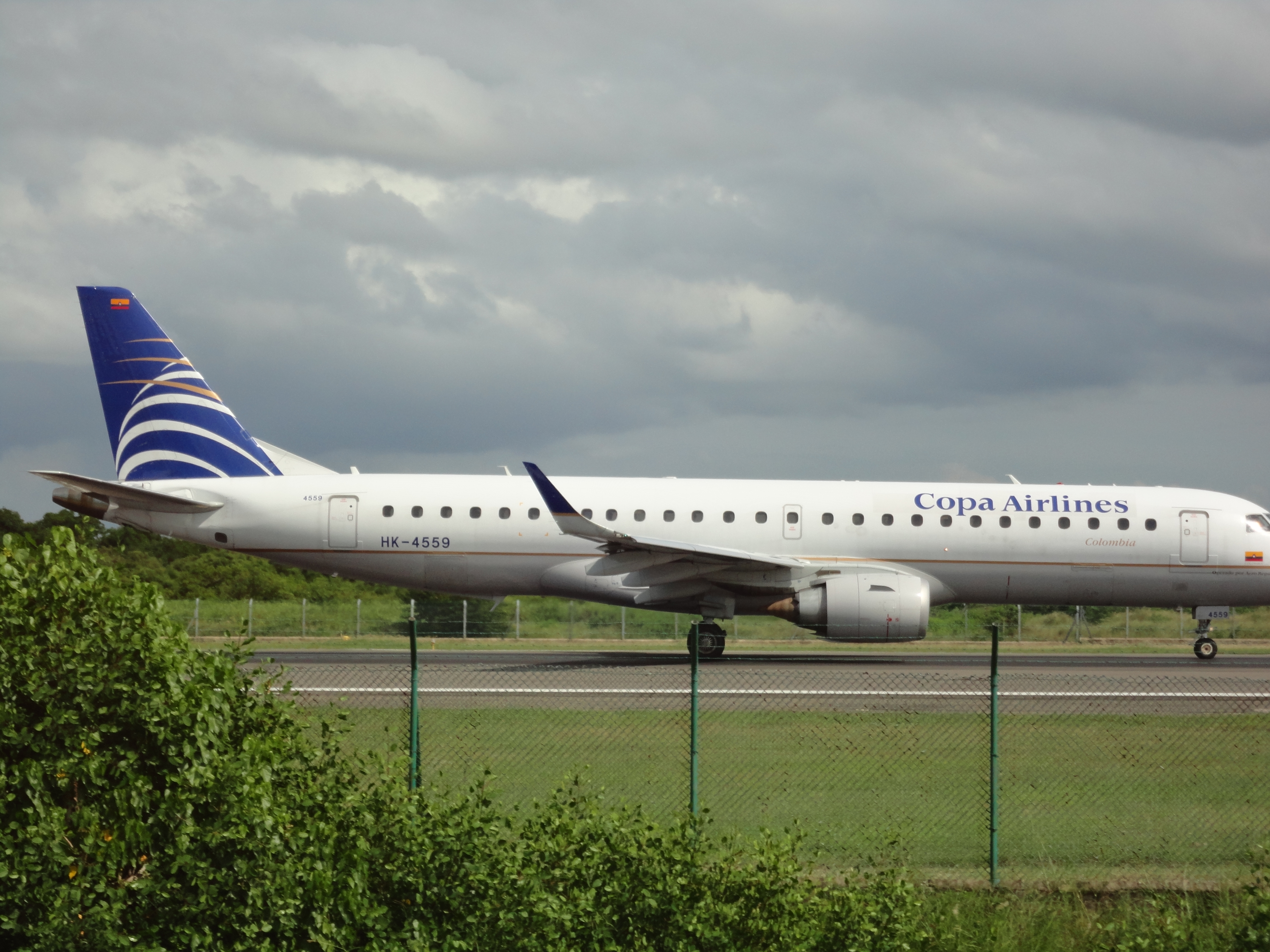 E-190